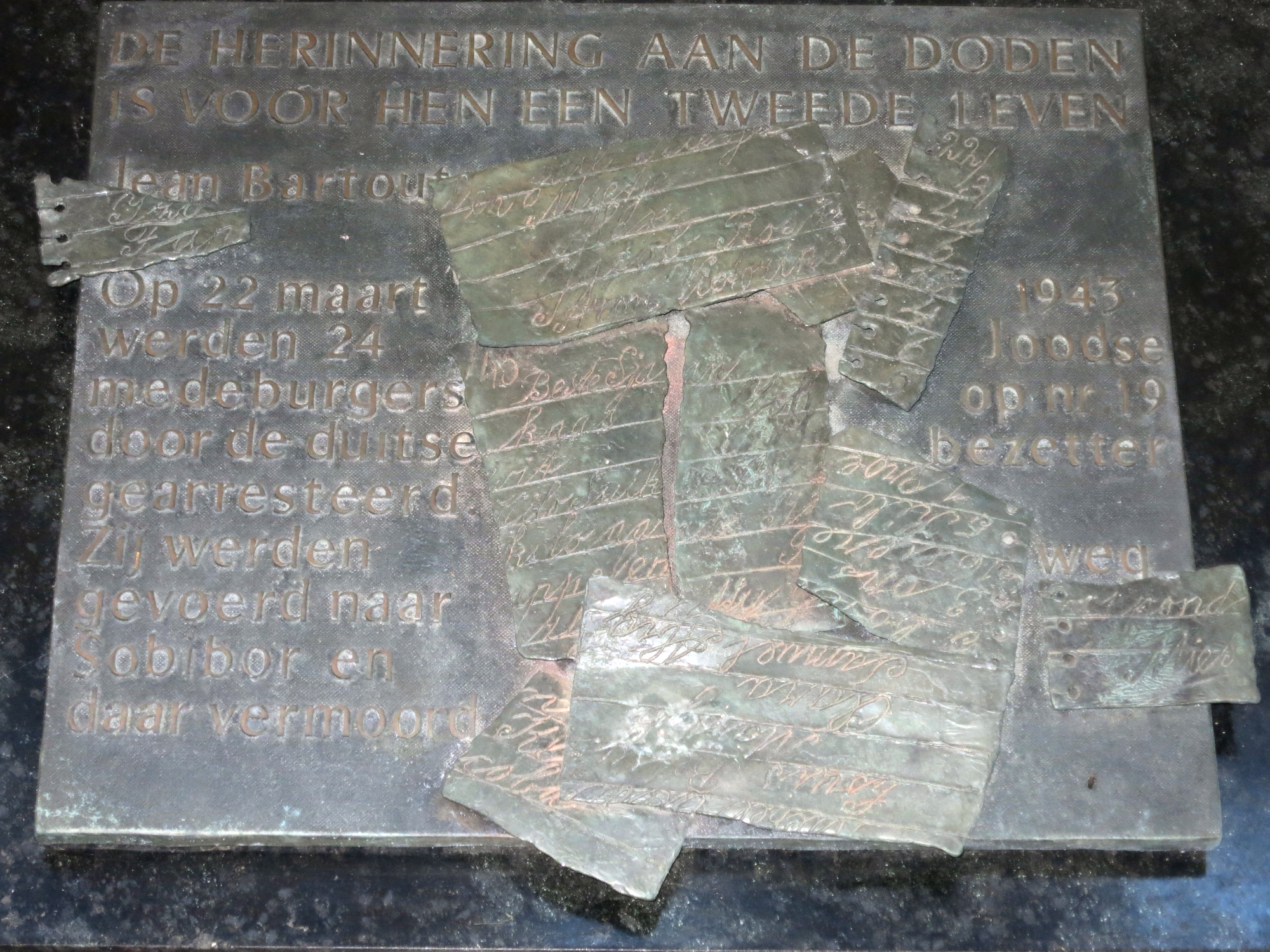 DE HERINNERING AAN DE DODEN IS VOOR HEN EEN TWEEDE LEVEN Jean Bartout Op 22 maart 1943 werden 24 Joodse medeburgers op nr. 19 door de duitse bezetter gearresteerd. Zij werden weggevoerd naar Sobibor en daar vermoord